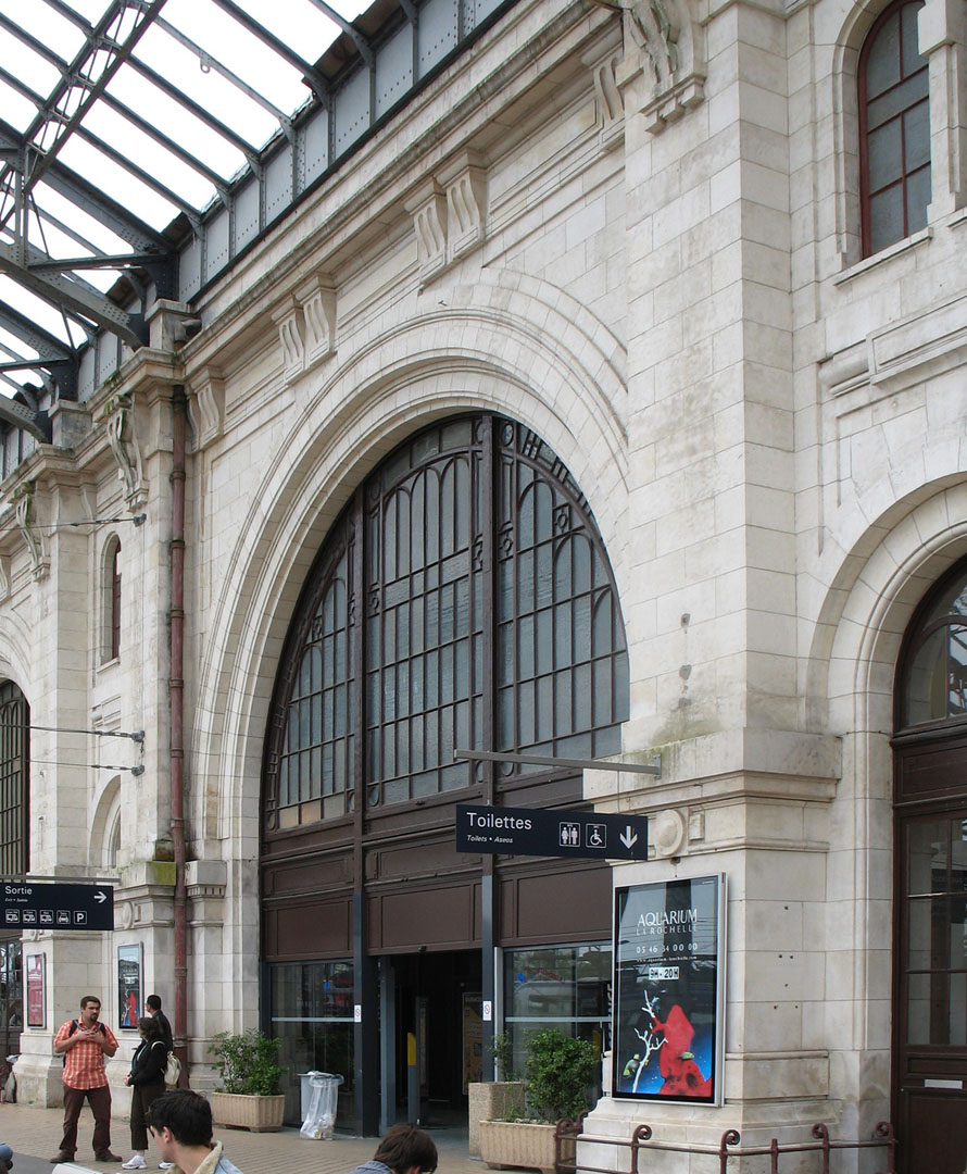 Gare de La Rochelle, France